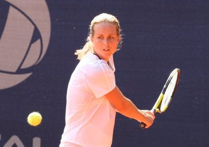 Tennisspielerin Meghann Shaughnessy